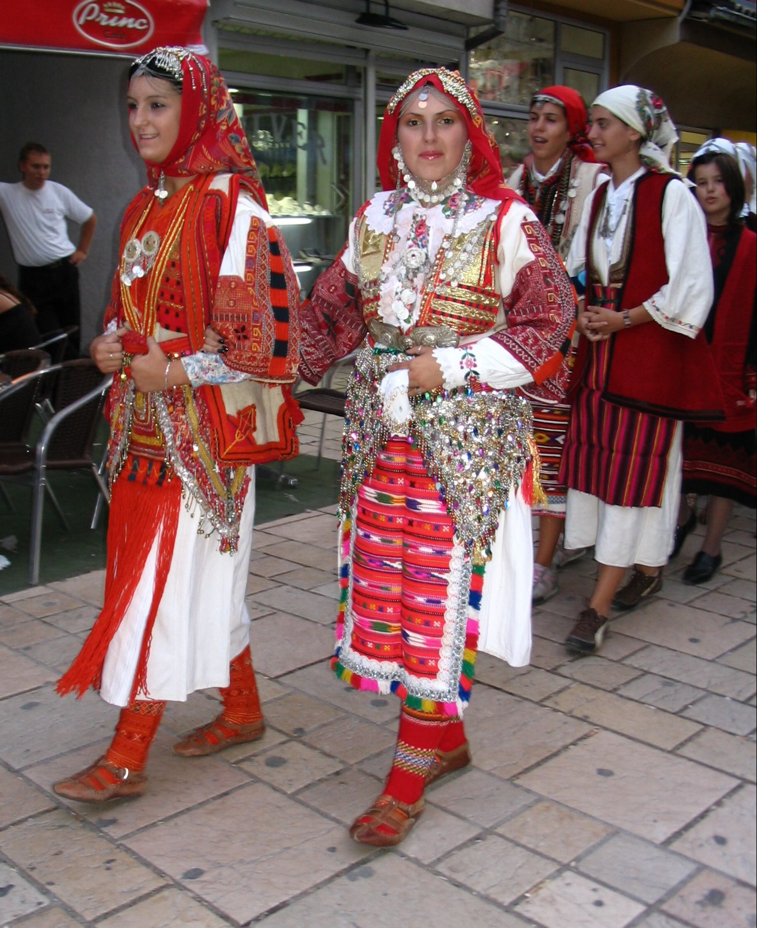 Narodna nosija od Jablanica